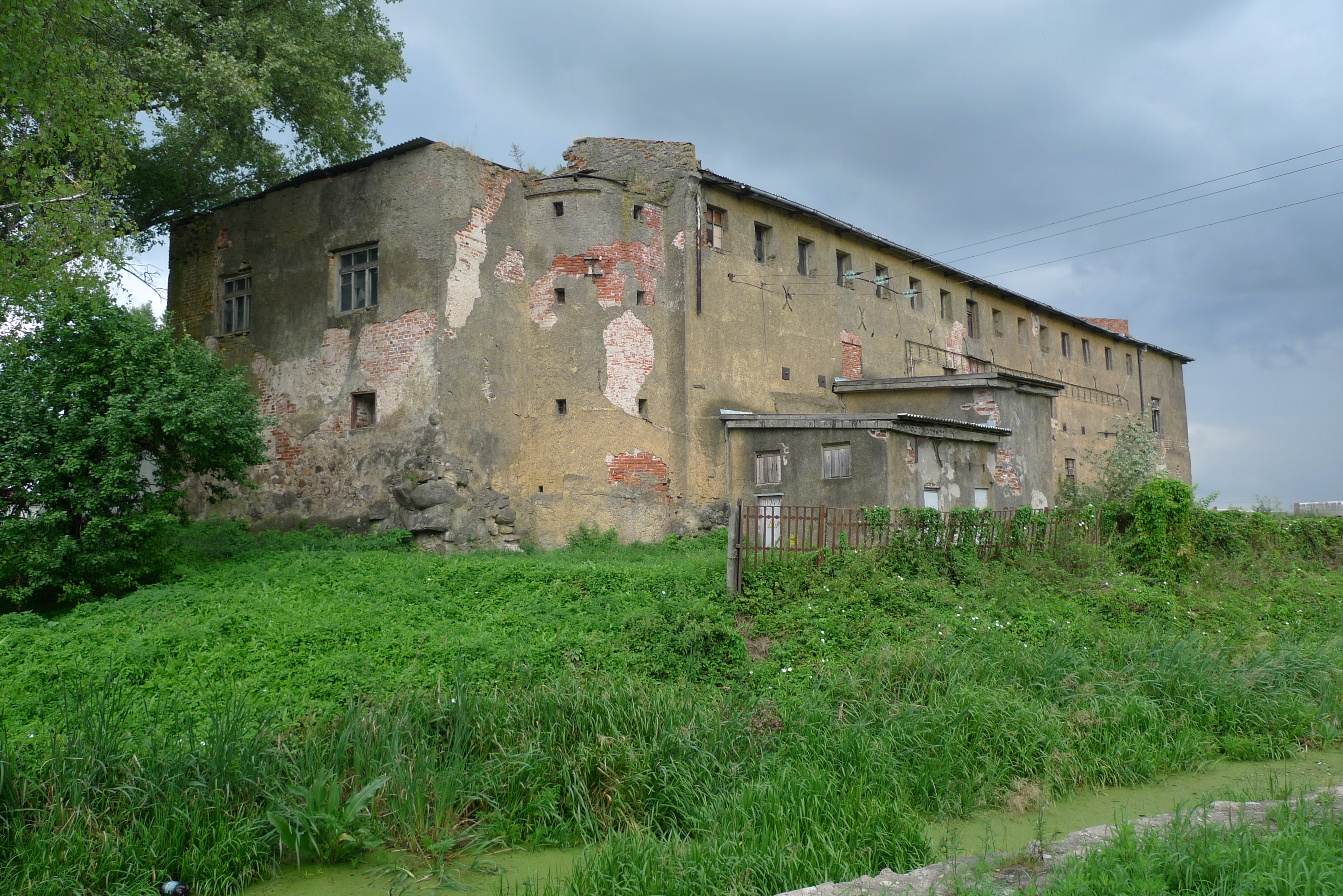 Замок Лабиау: улица Калининградская, 1, Полесск, Полесский район, Калининградская область